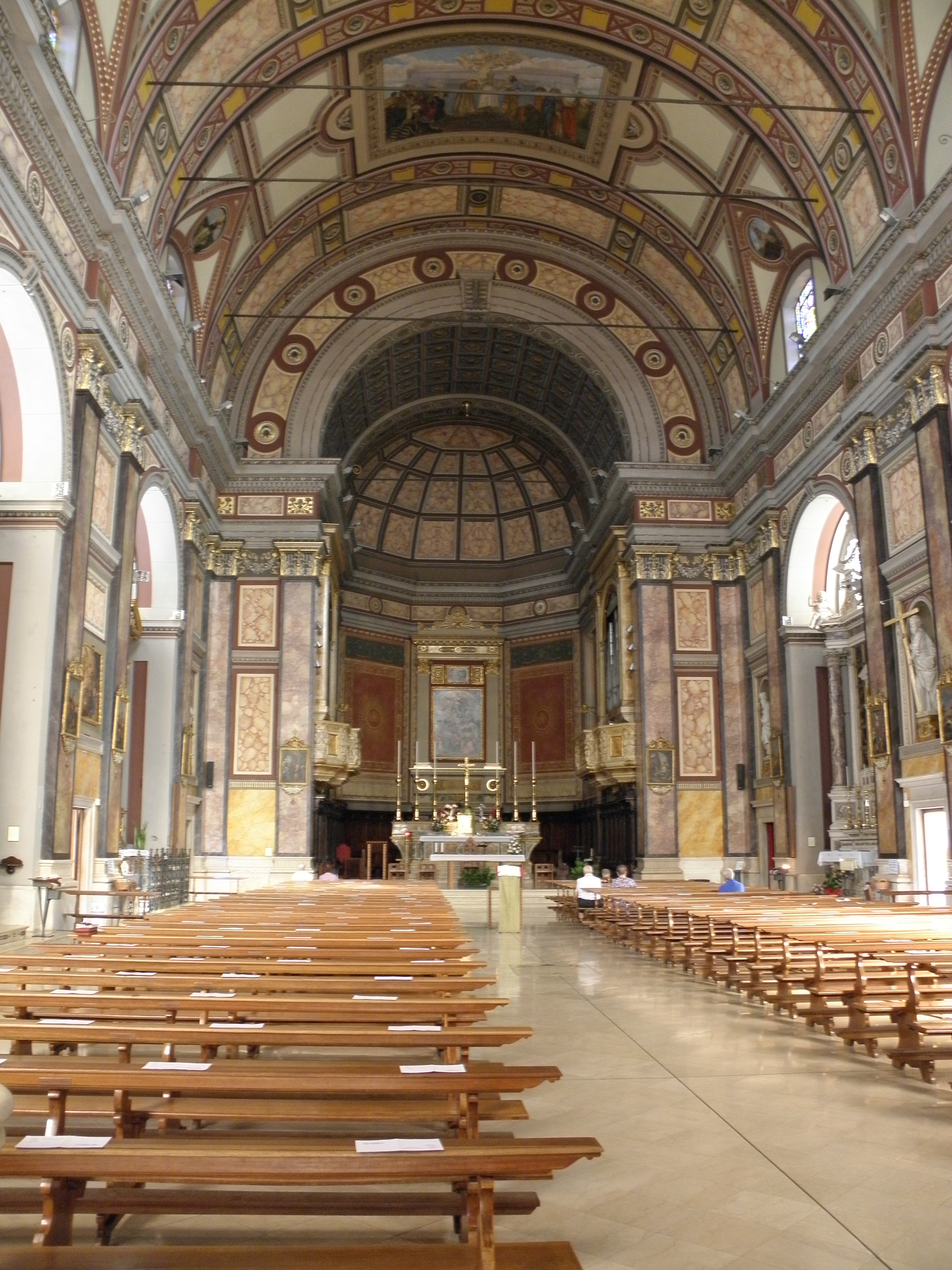 Ghedi, Chiesa parrocchiale di Santa Maria Assunta: interno.